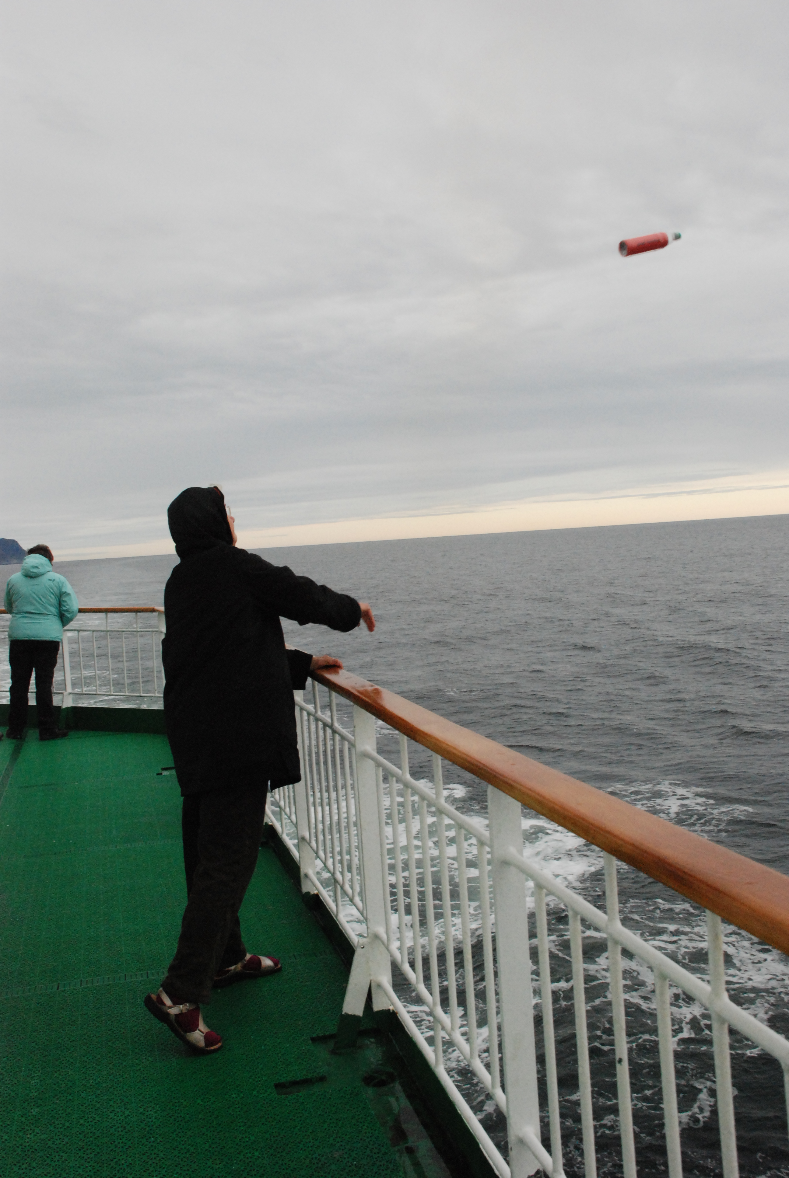 Eine Flaschenpost wird während einer Hurtigruten-Fahrt gestartet